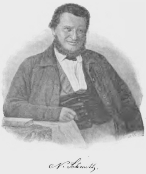 Nikolaus Eduard Heinrich Schmitt